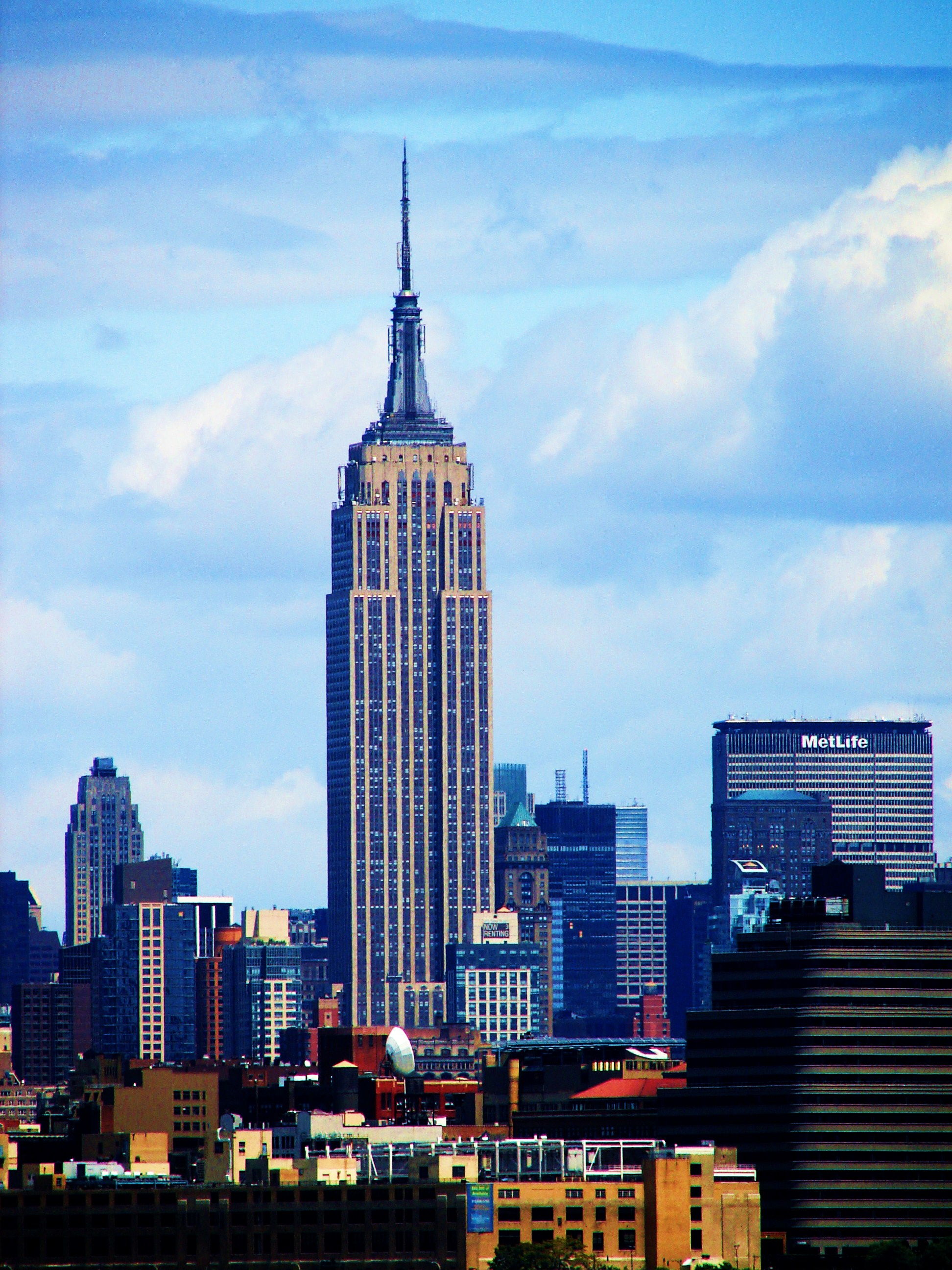 എമ്പയർ സ്റ്റേറ്റ് ബിൽഡിങ്ങ്, ന്യൂയോർക്ക് നഗരം